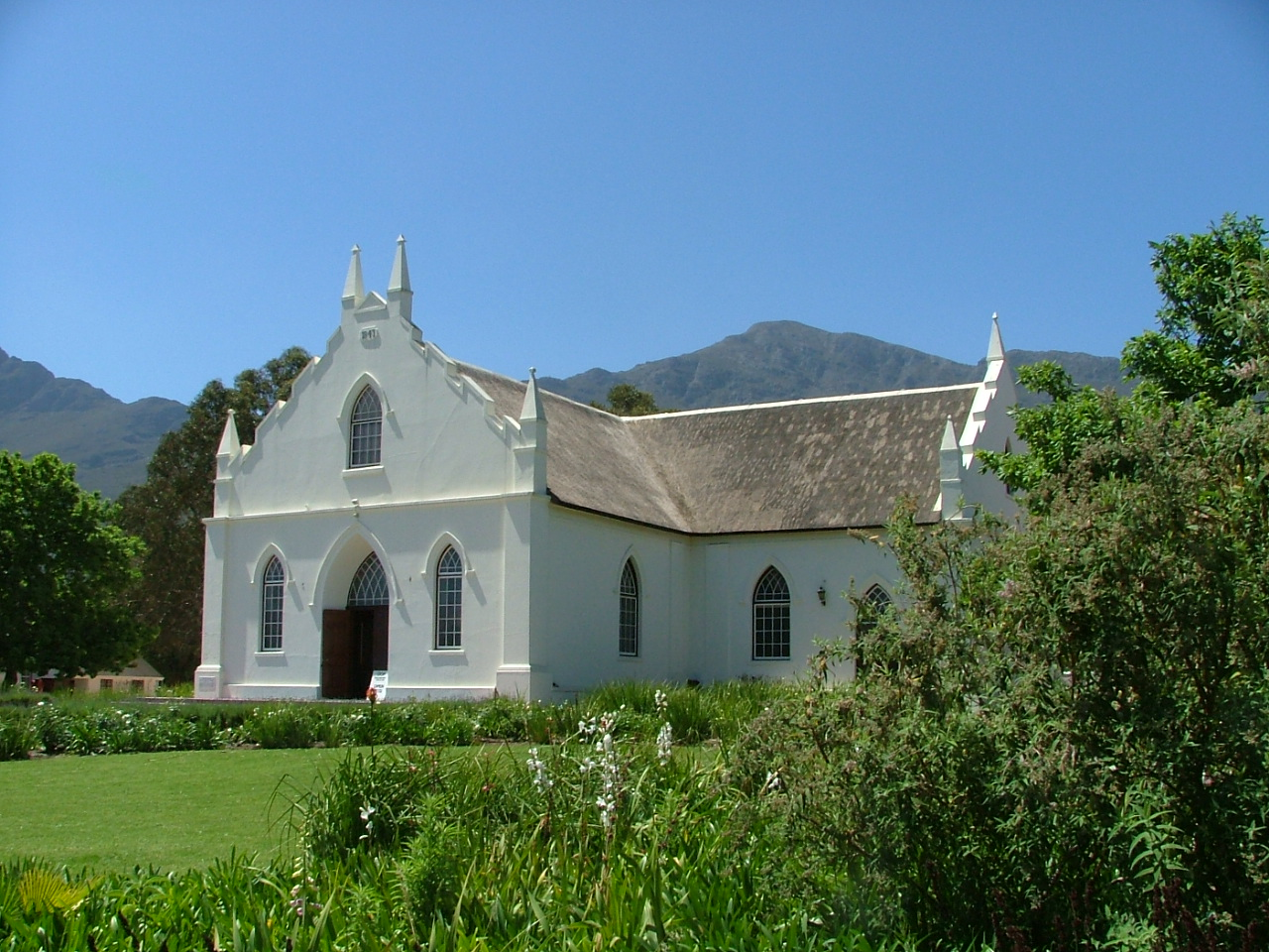 photo par contributeur, pas de copyright